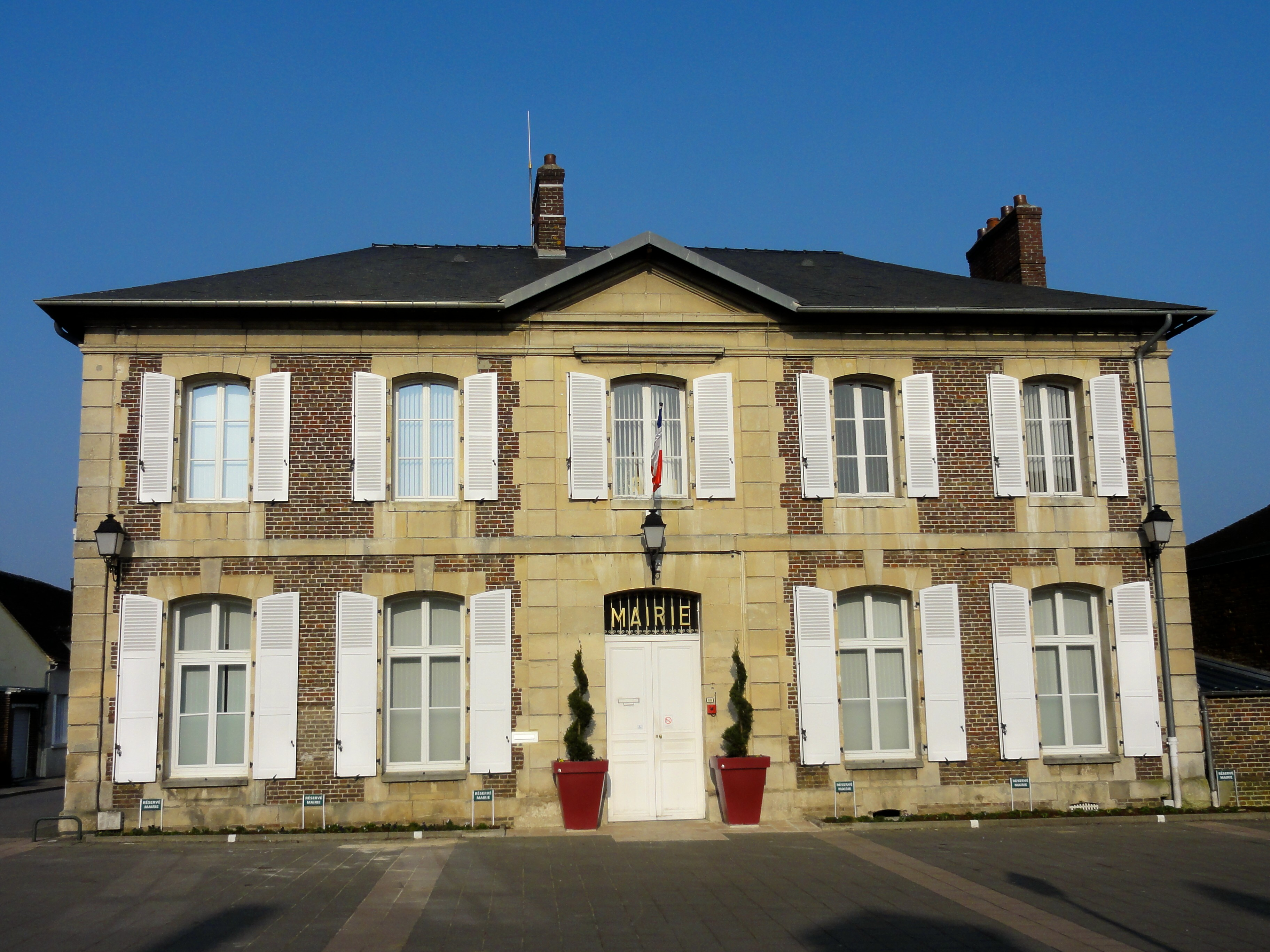 La mairie, rue de la République / rue du général Leclerc, près de l'église.